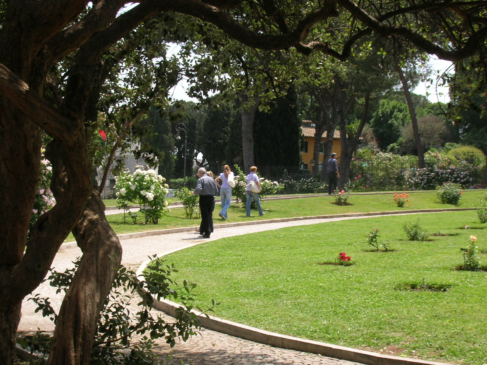 Roseto comunale di Roma